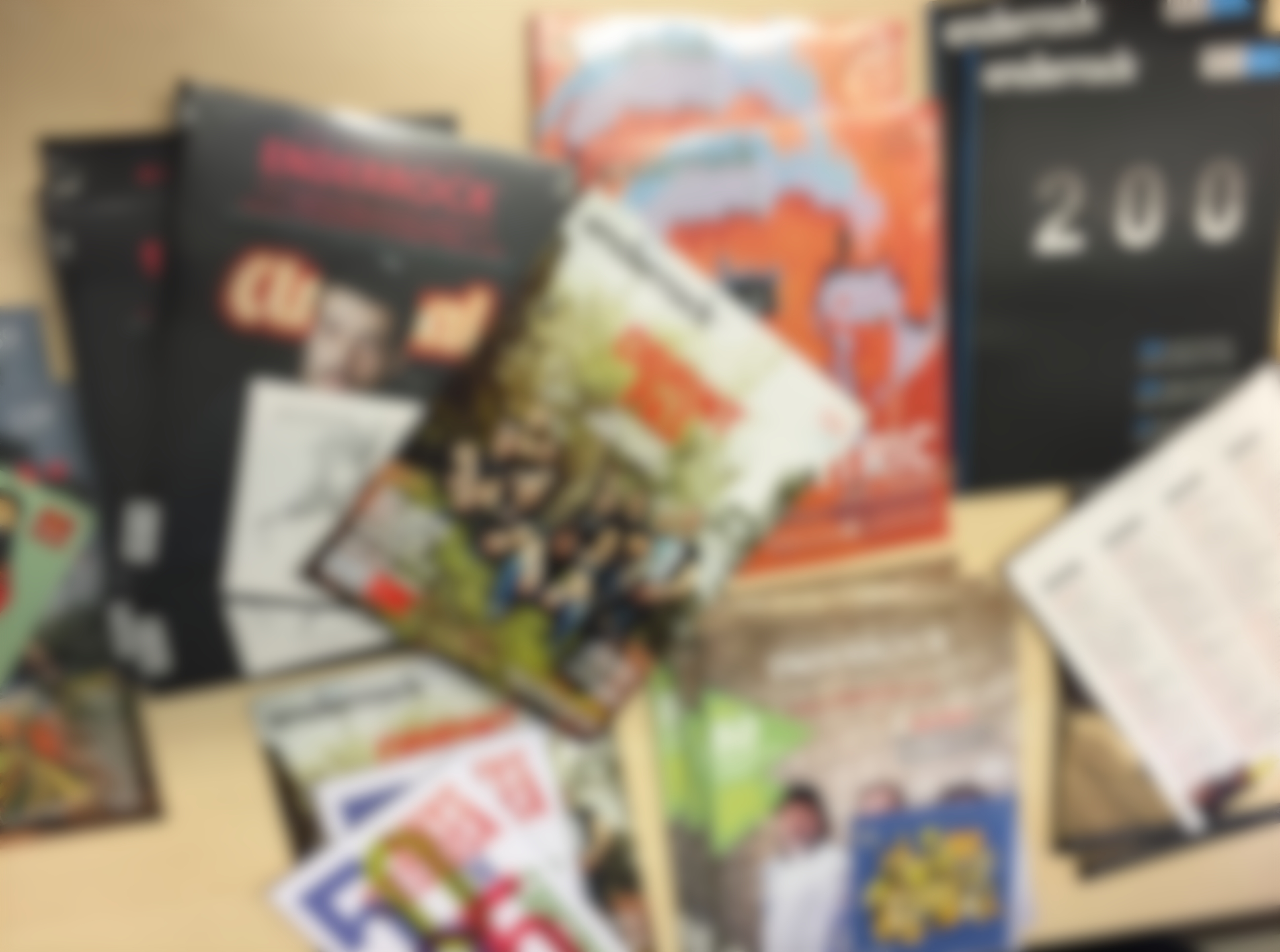 Diverses cobertes d'Enderrock. Sense focus a causa del dret d'autor.